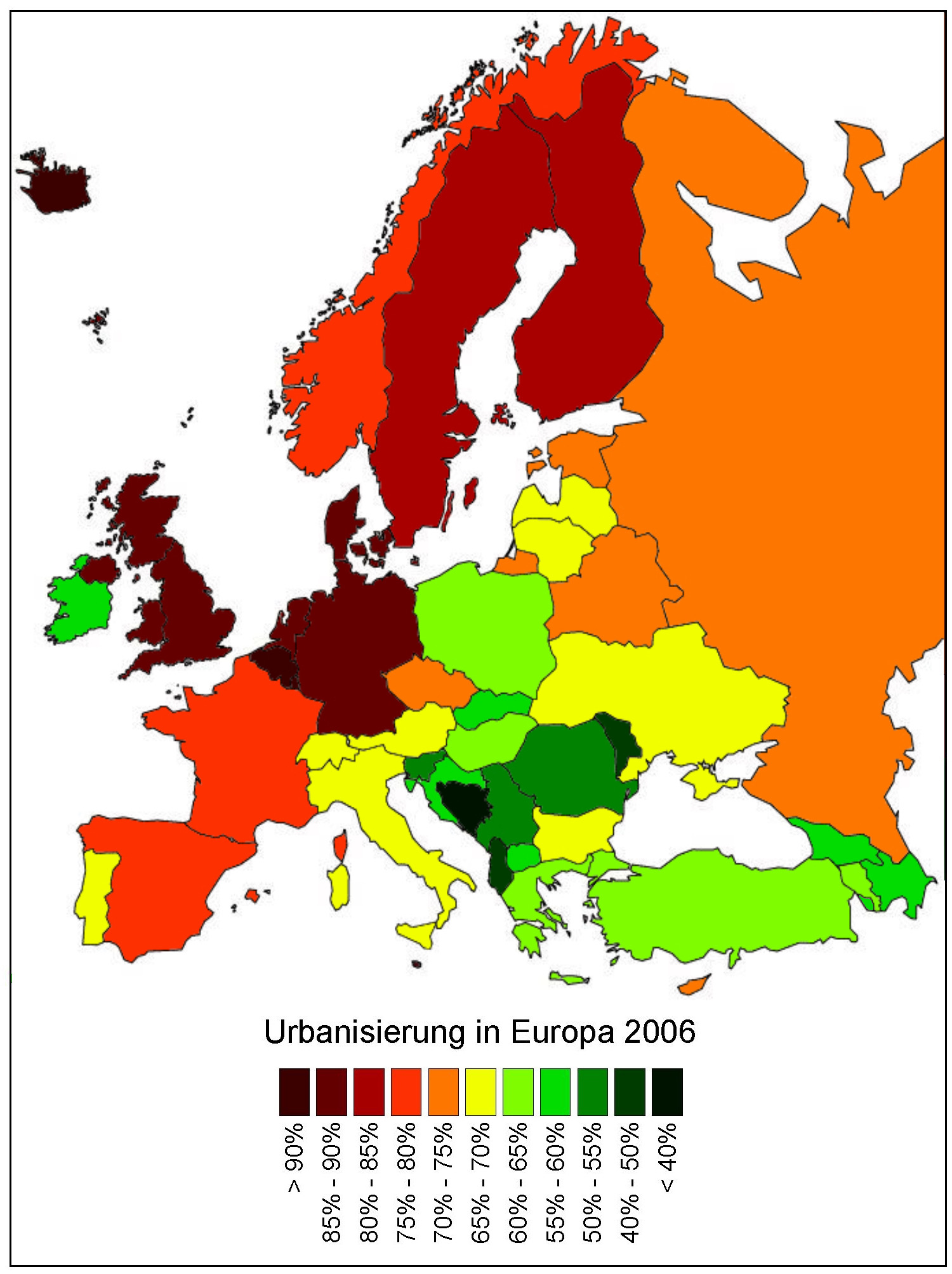 Urbanisierung in Europa 2006